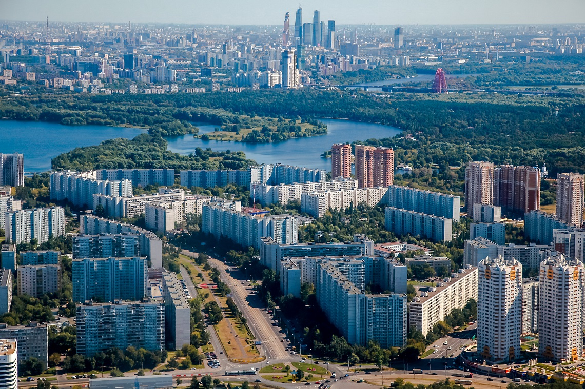 Таллинская улица, уходящая от кругового перекрёстка вверх в сторону Большого Строгинского затона.